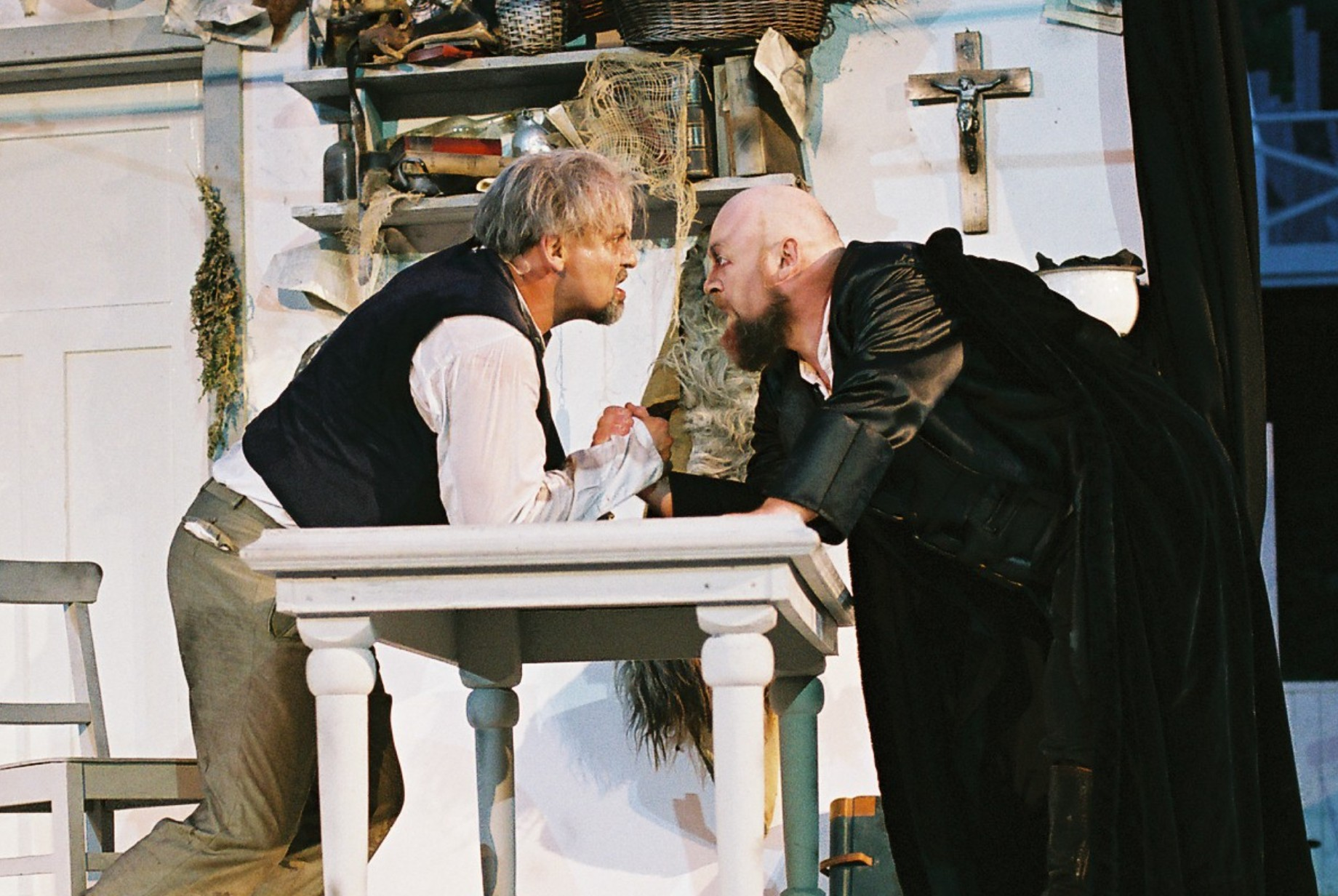 Waldfestspiele Bad Kötzting, 2006 "Faust" - Der Pakt zwischen Dr. Faustus und Mephisto